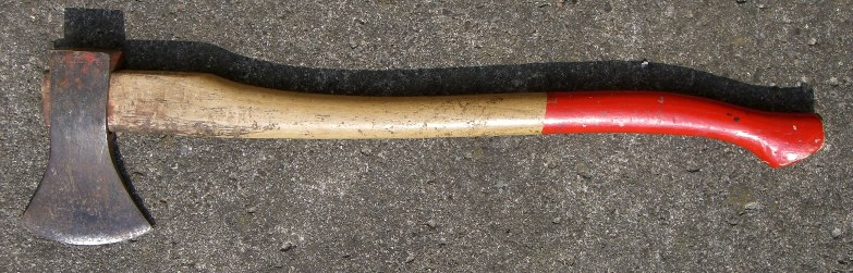 axe / Axt